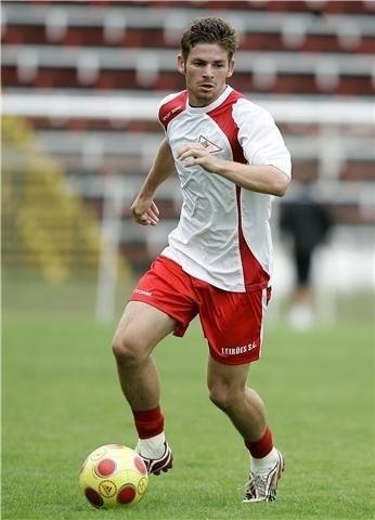 jugador de futbol profesional